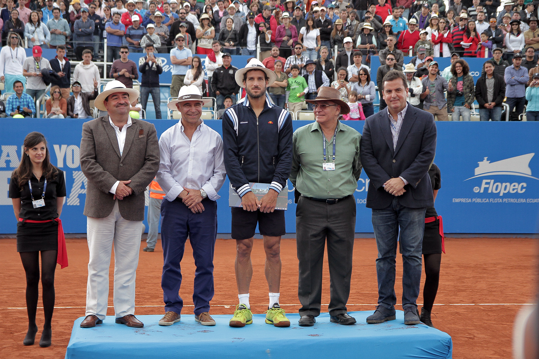 Quito, 08 feb (ANDES).- Final ATP 250 Ecuador Open Quito donde compitieron por el campeonato los tenistas Victor Estrella y Feliciano López. Fotografías: Carlos Rodríguez/ANDES.